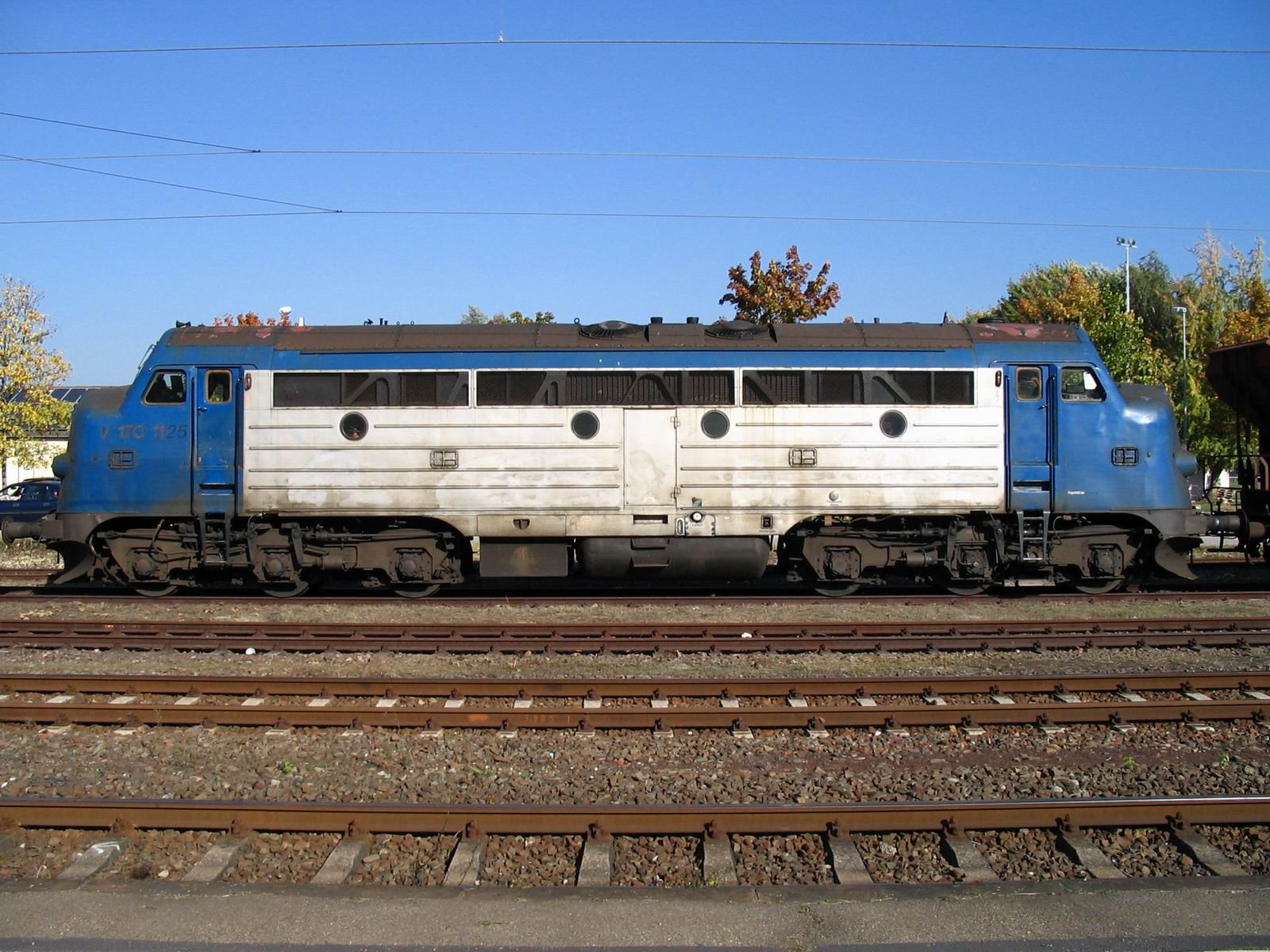 NOHAB V 170 1125 auf Gleis Nr. 6, Bahnhof Remchingen